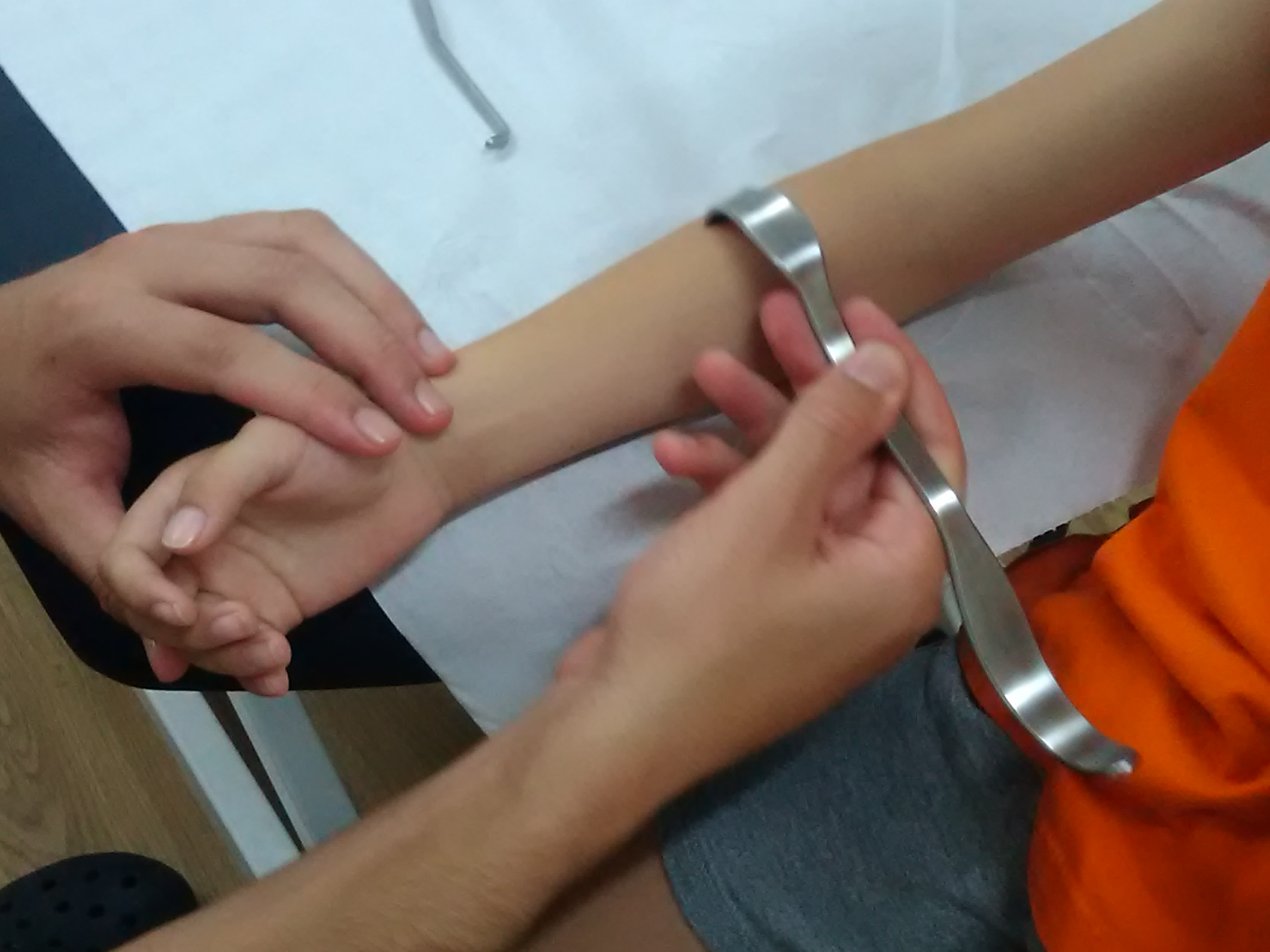 Fibrolisi diakutaneoa: besaurreko muskuluak tratatzen altzairuzko kakoarekin.